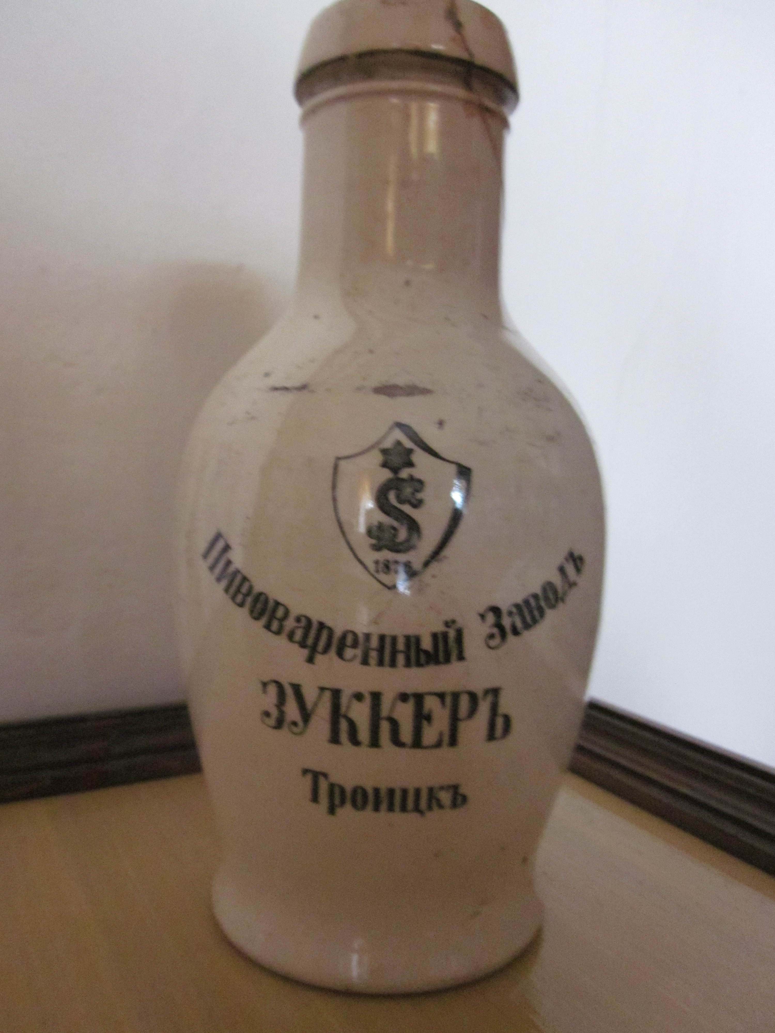 Одна из бутылок, выпускаемые во времена Зуккера, имели свой фирменный знак в виде буквы S